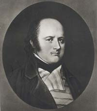 Portrait von Samuel Schindler (1762–1830)